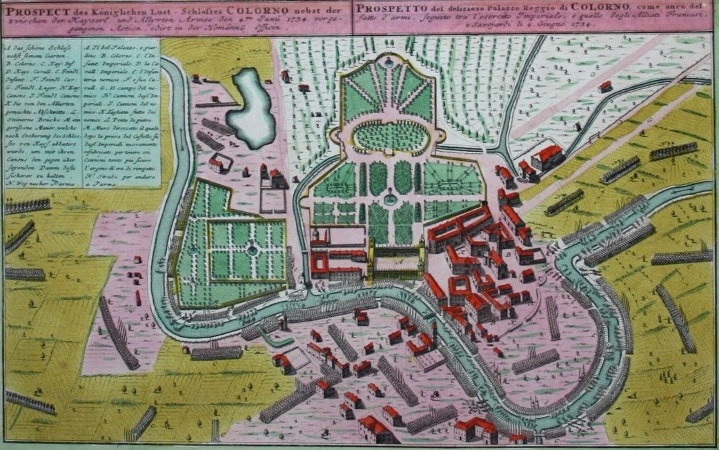 Stampa a colori Homann Heredes del 1740 sulla Battaglia di Colorno del 1734.